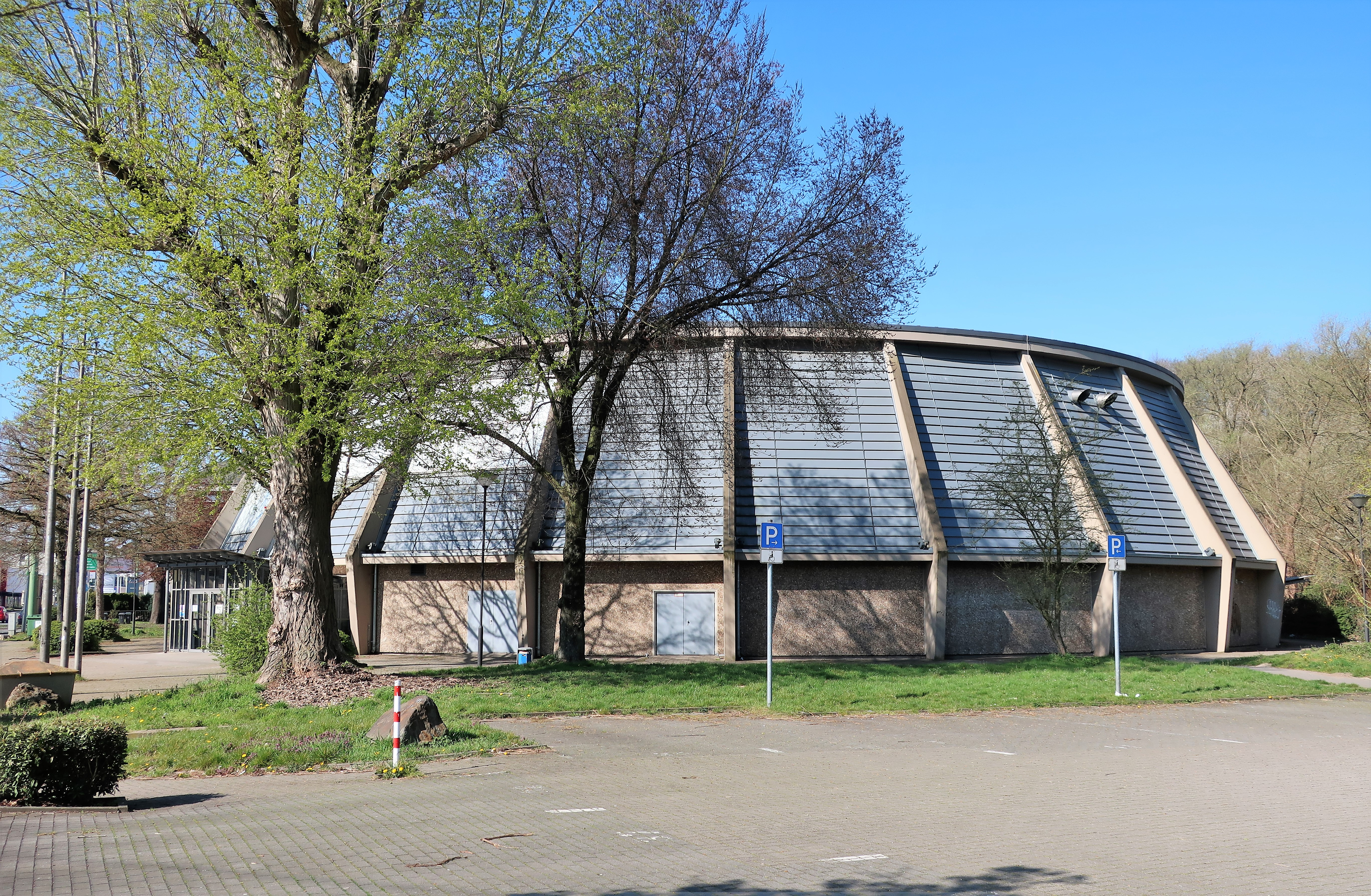 Rundsporthalle in Hagen-Haspe, Kölner Straße 50. Eine von drei Rundturnhallen in Hagen.